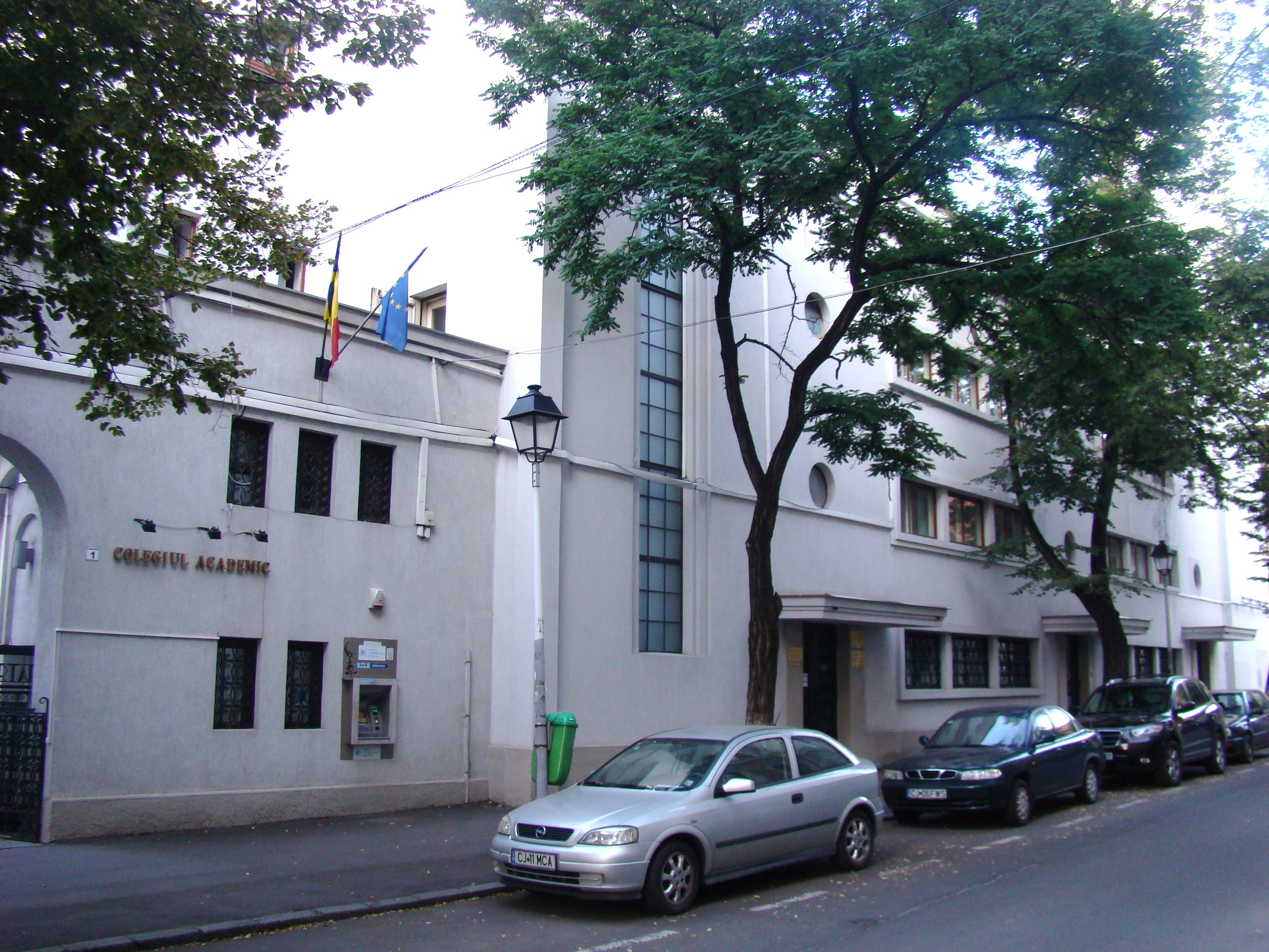 Casa universitarilor, azi Colegiul academic